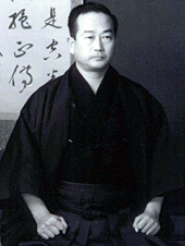 Il Maestro Masatoshi Nakayama, 10 Dan, è da considerarsi in assoluto uno dei più grandi maestri nella storia del Karate moderno, ovvero post Funakoshi.